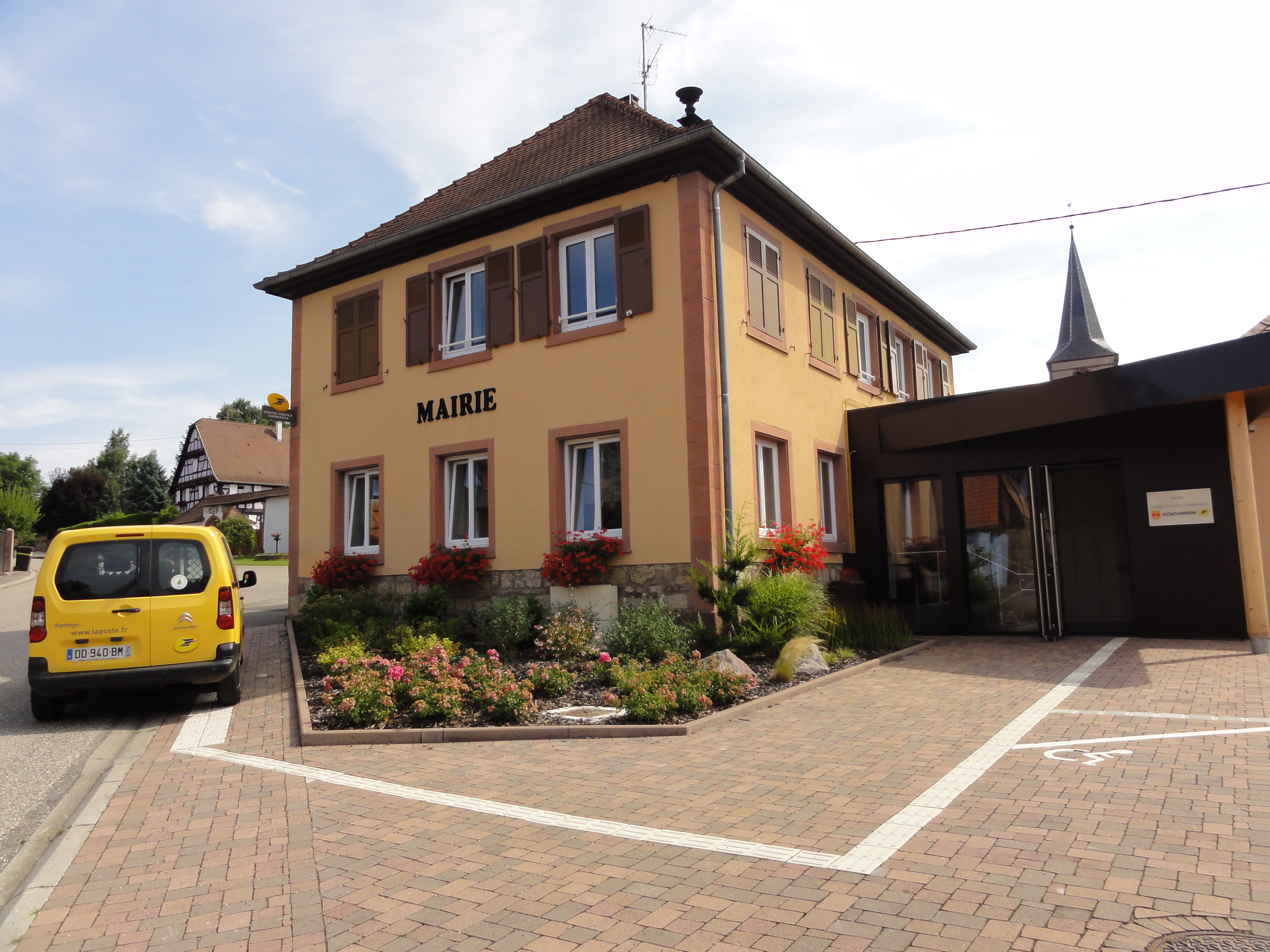 Alsace, Bas-Rhin, Gougenheim, Ancienne école (1841), actuellement mairie, 2 place de la Libération. .